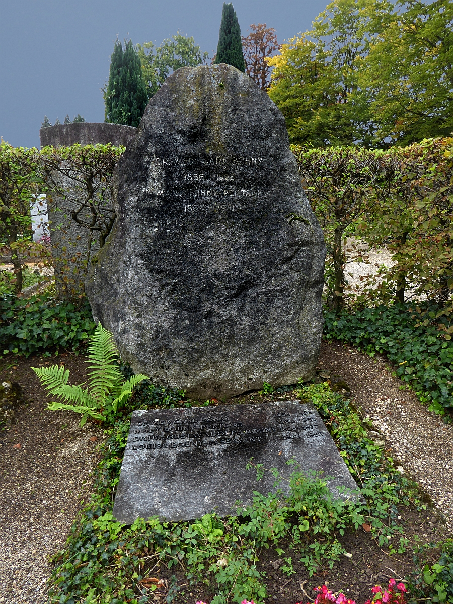 Gustav Adolf Bohny (1898–1977) Jurist, Notar, Präsident des Schweizerischen Roten Kreuzes, SRK. Grab auf dem Friedhof Wolfgottesacker, Basel